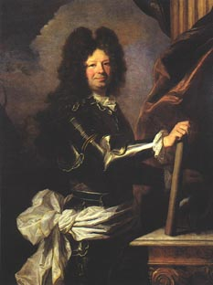 Portrait of François Agésilas de Grossoles